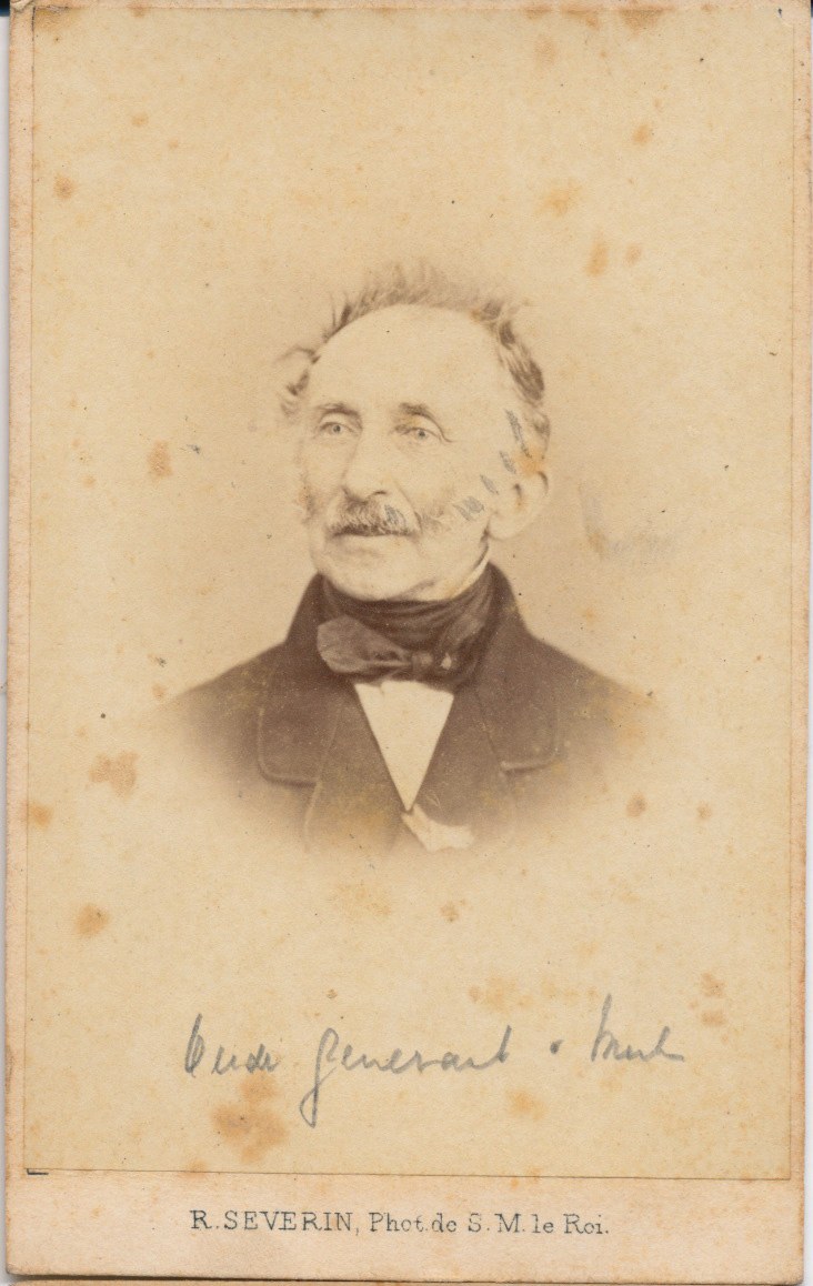 Jonkheer Bernard van Merlen (25 april 1800 - 19 december 1890)